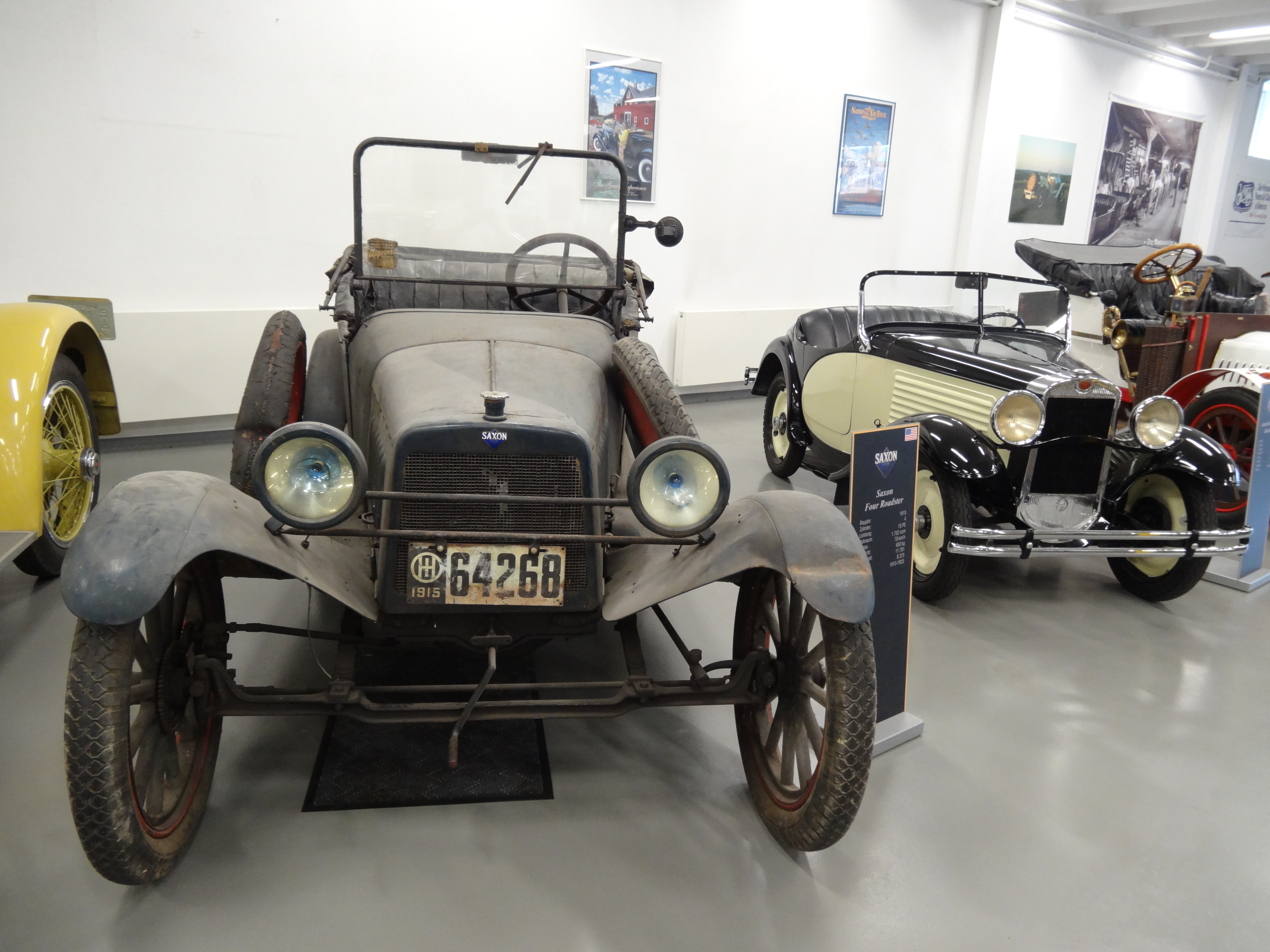 Autosammlung Steim - Schramberg 006 Saxon Four Roadster